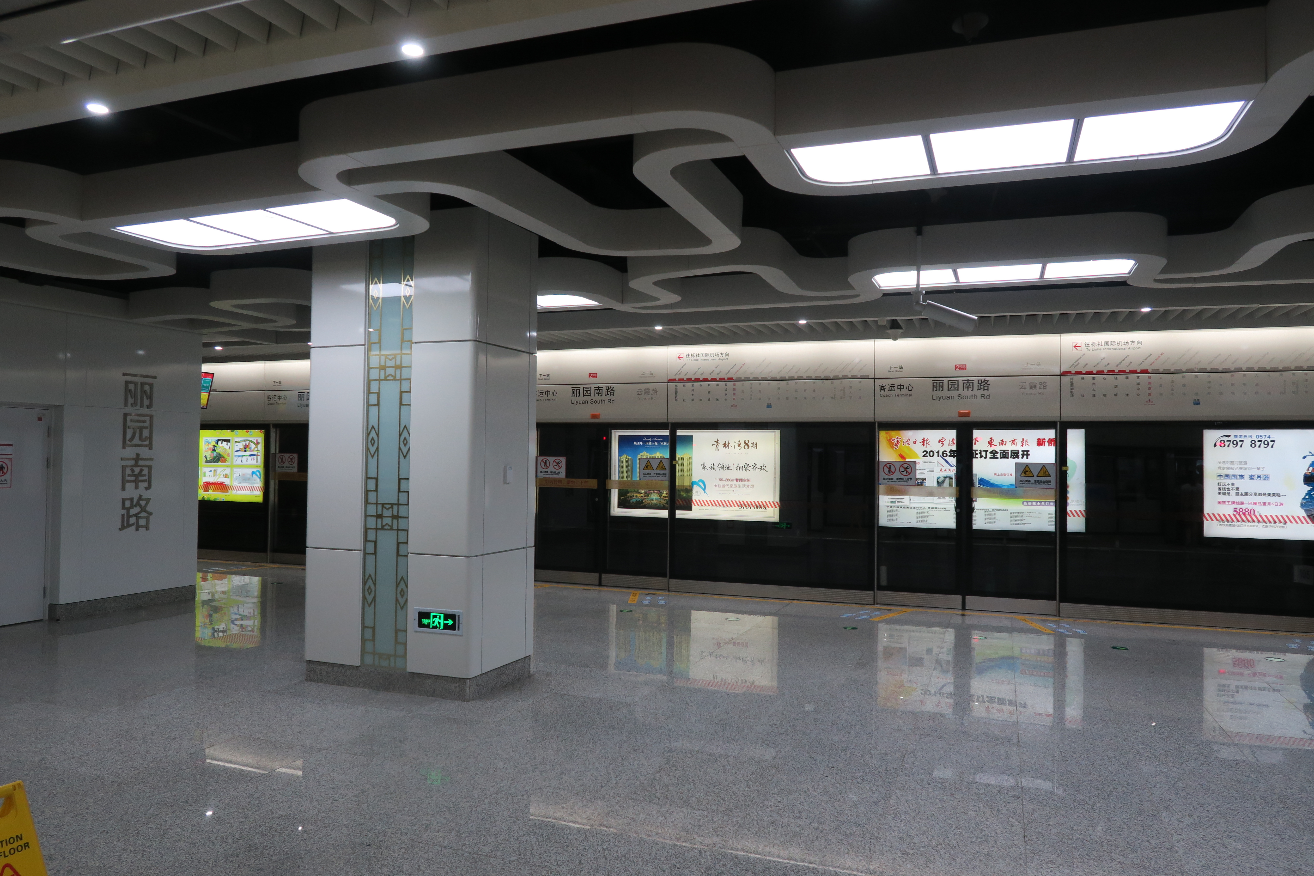 宁波地铁丽园南路站